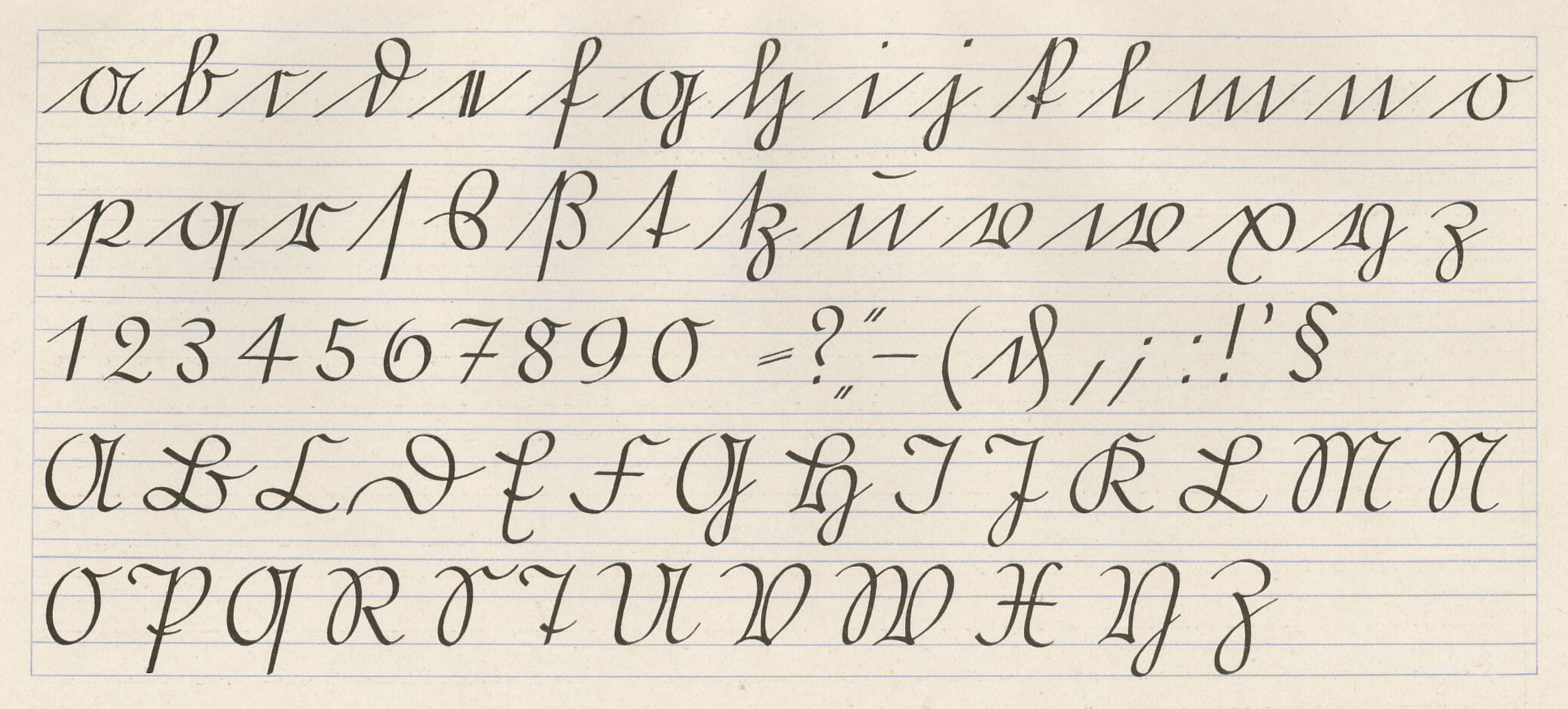 Deutsches Alphabet in Offenbacher Schrift, mit Breitfeder geschrieben. Ursprüngliche Beschreibung: "Das deutsche Alphabet der kleinen und großen Buchstaben in ihrer Stellung auf den Linien."